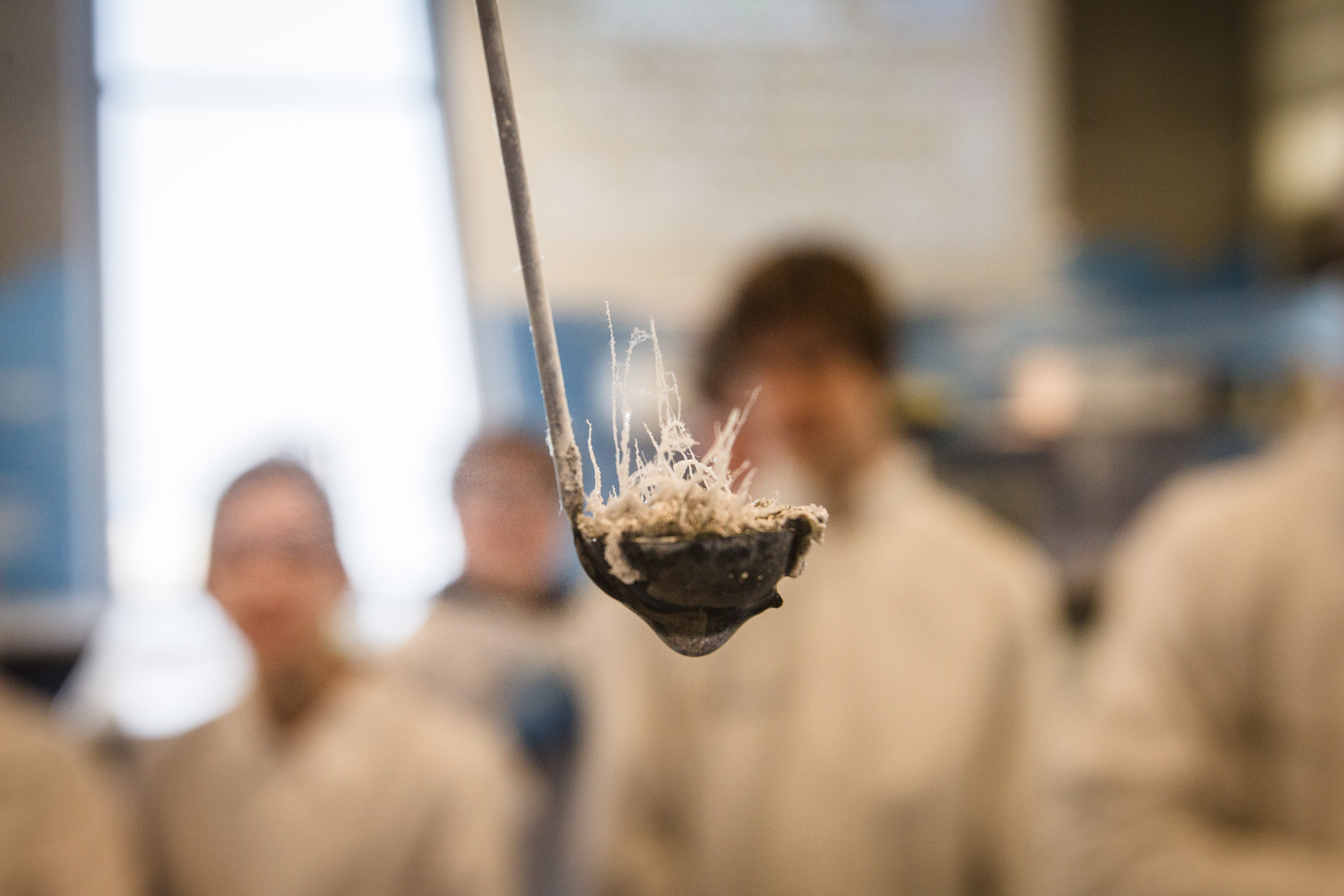 Efekt reakcji utleniania magnezu w parze wodnej. Laboratorium, Centrum Nauki Kopernik, fot. Robert Kowalewski